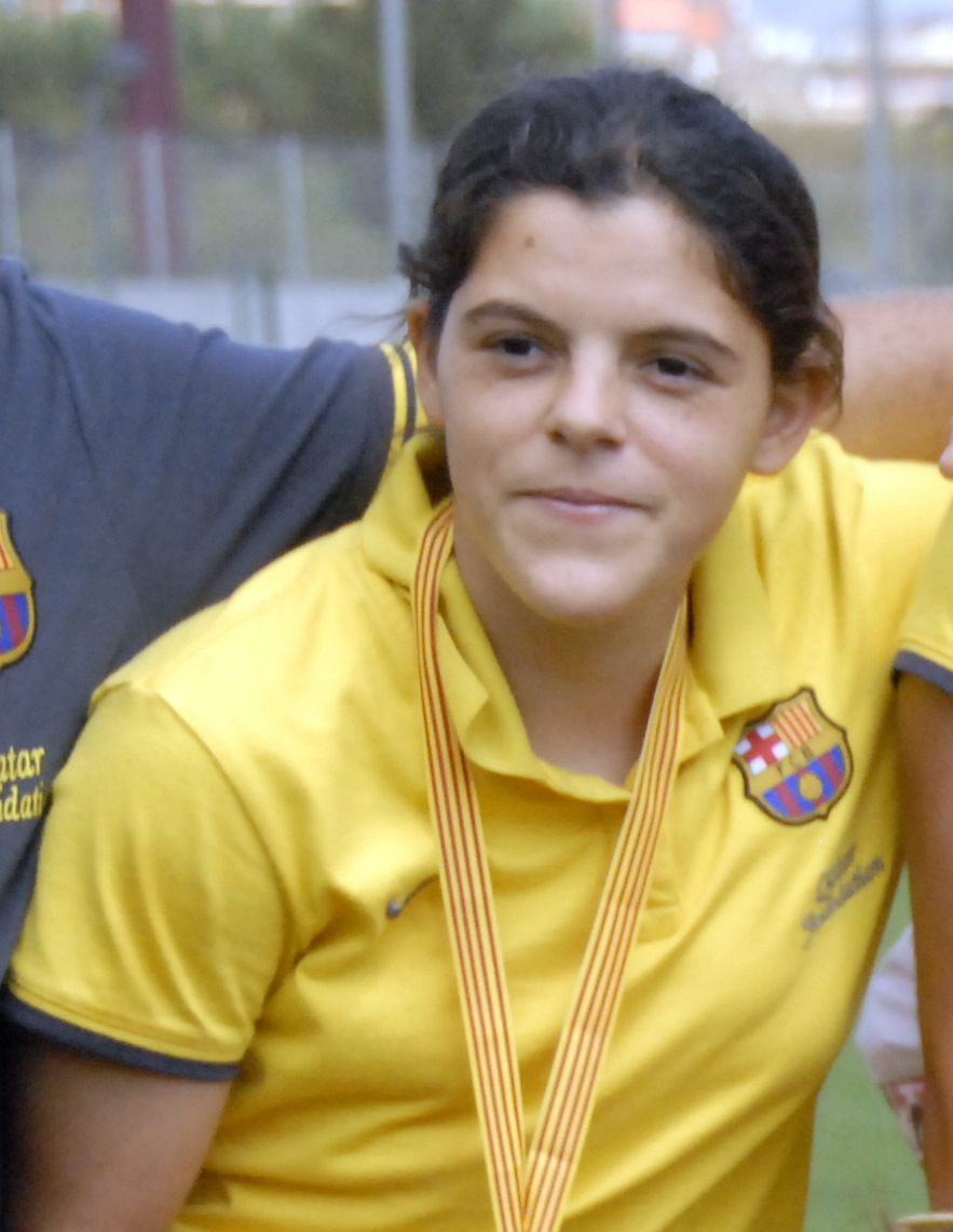 Final Copa Catalunya Femenina